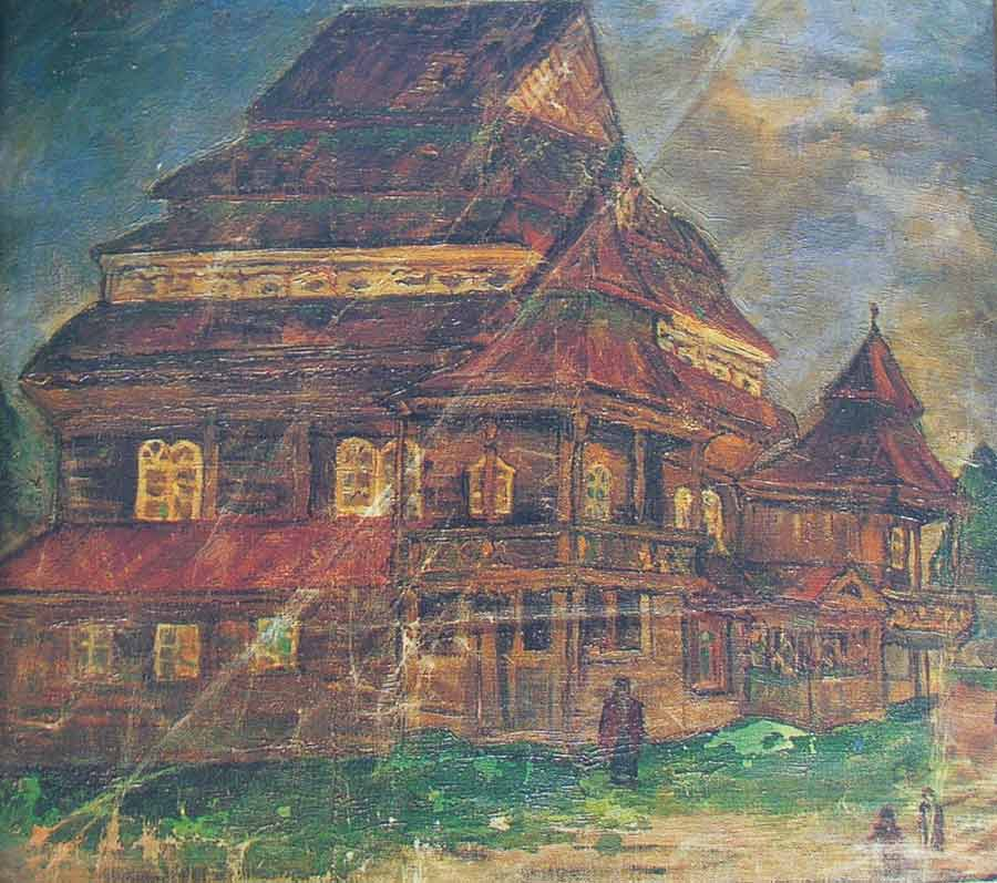 Сінагога ў Нароўлі